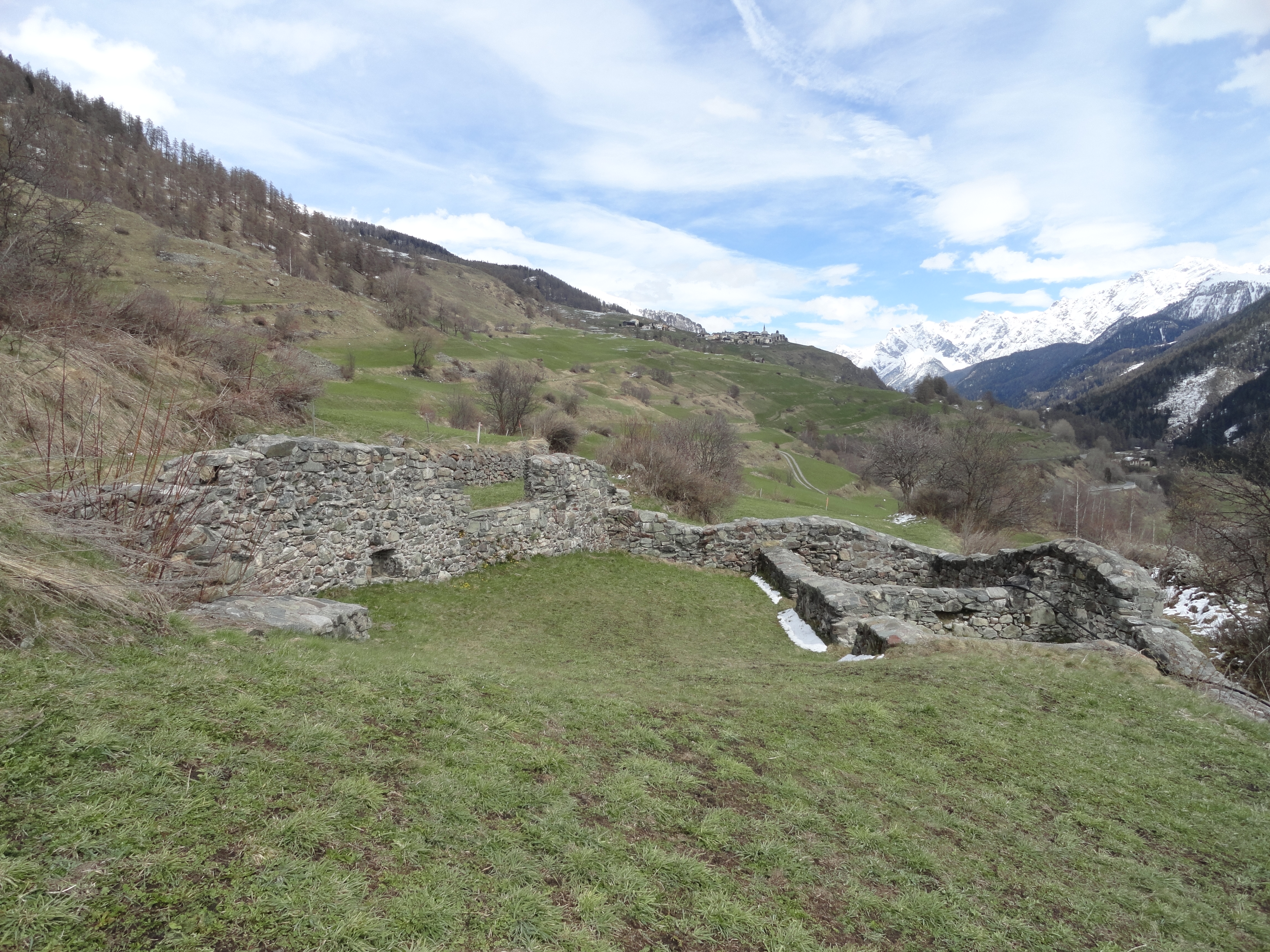 Gonda (Lavin) Mauerrest eines Gebäudes